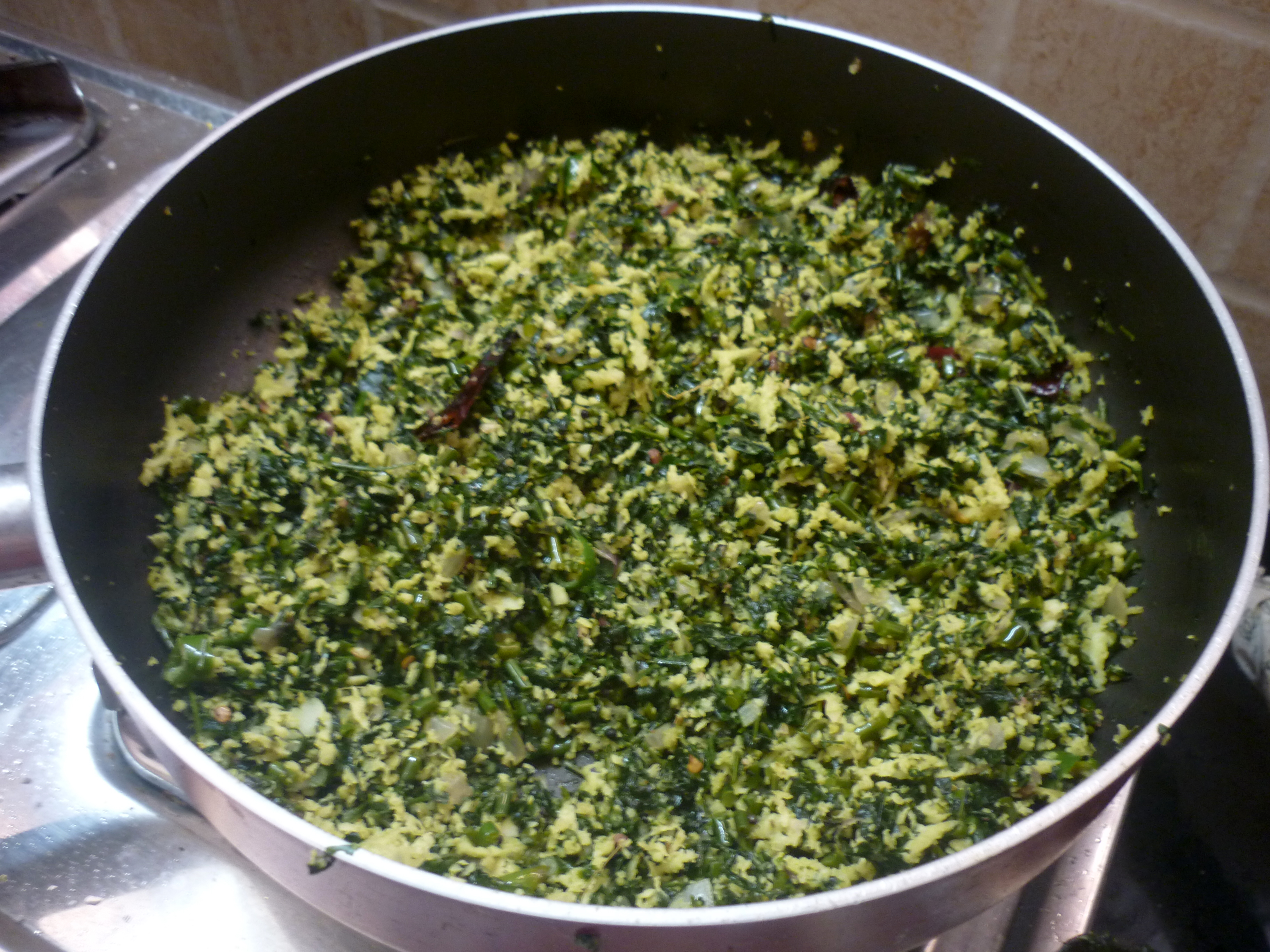 മൈസൂർ ചീര തോരൻ